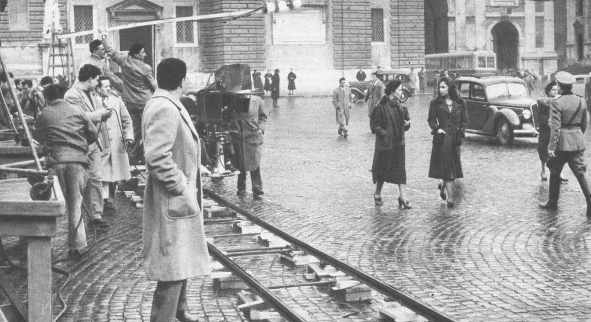 Set de "la romana" 1954